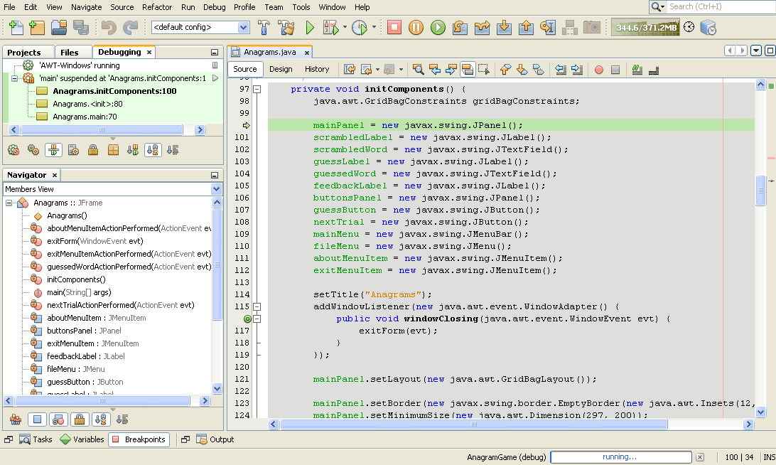 Монгол: Зүгшрүүлэгч